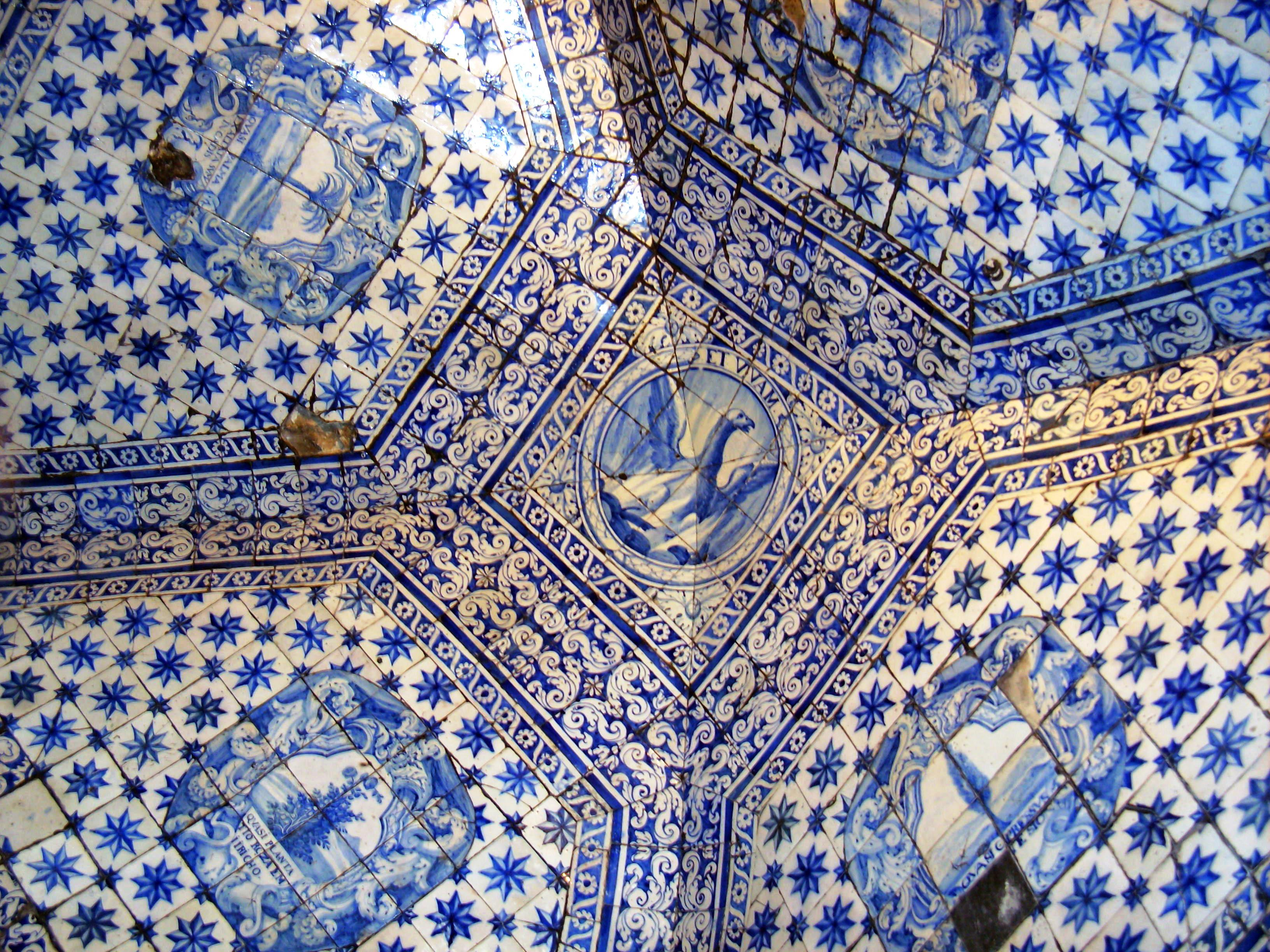 Ermida da Memória, sítio da Nazaré, vila e concelho da Nazaré, distrito de Leiria, Portugal: azulejos da abóbada do piso térreo.